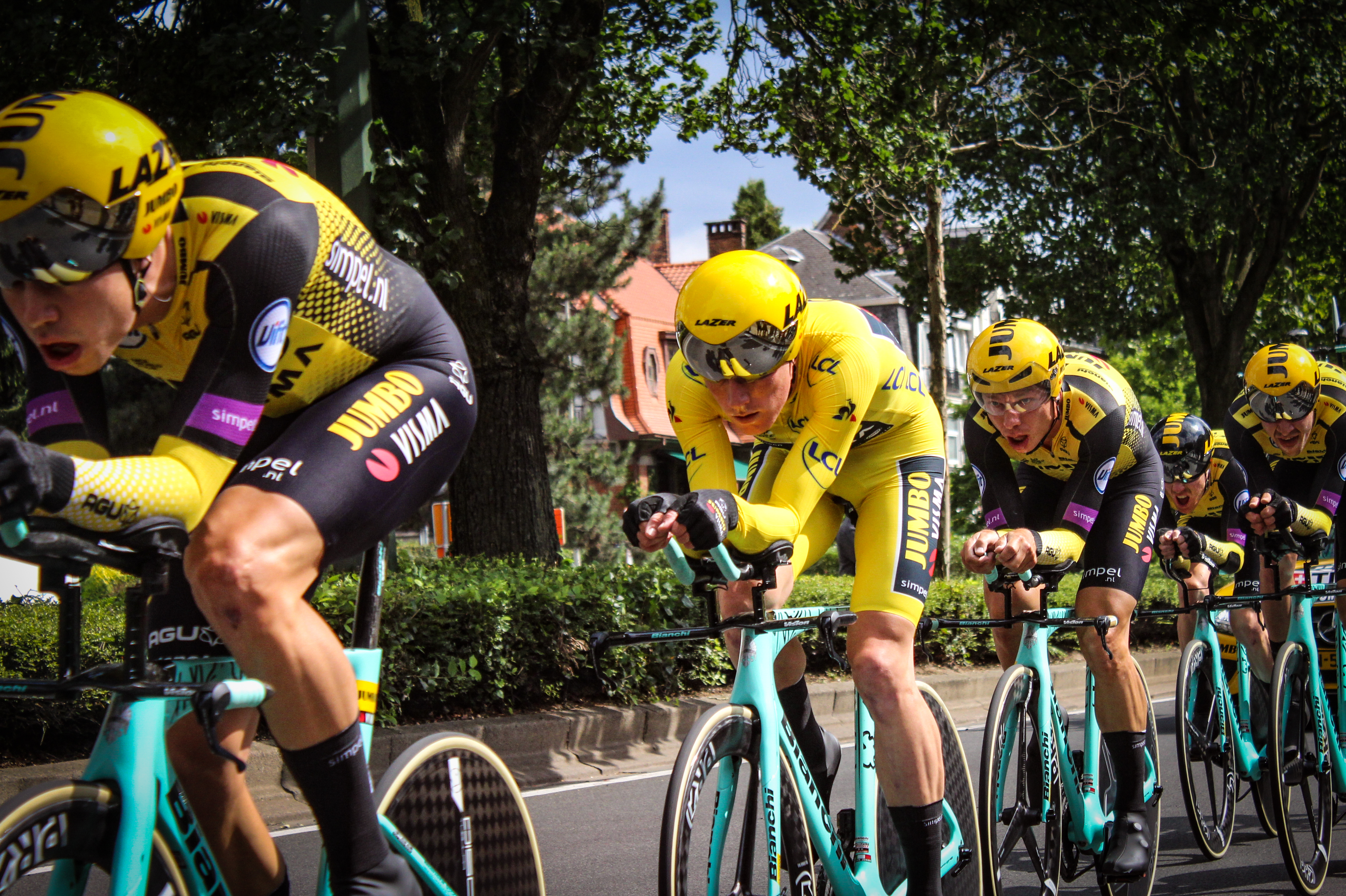 Mike Teunissen en jaune lors de la deuxième étape du Tour de France 2019 (contre la montre par équipes à Bruxelles)